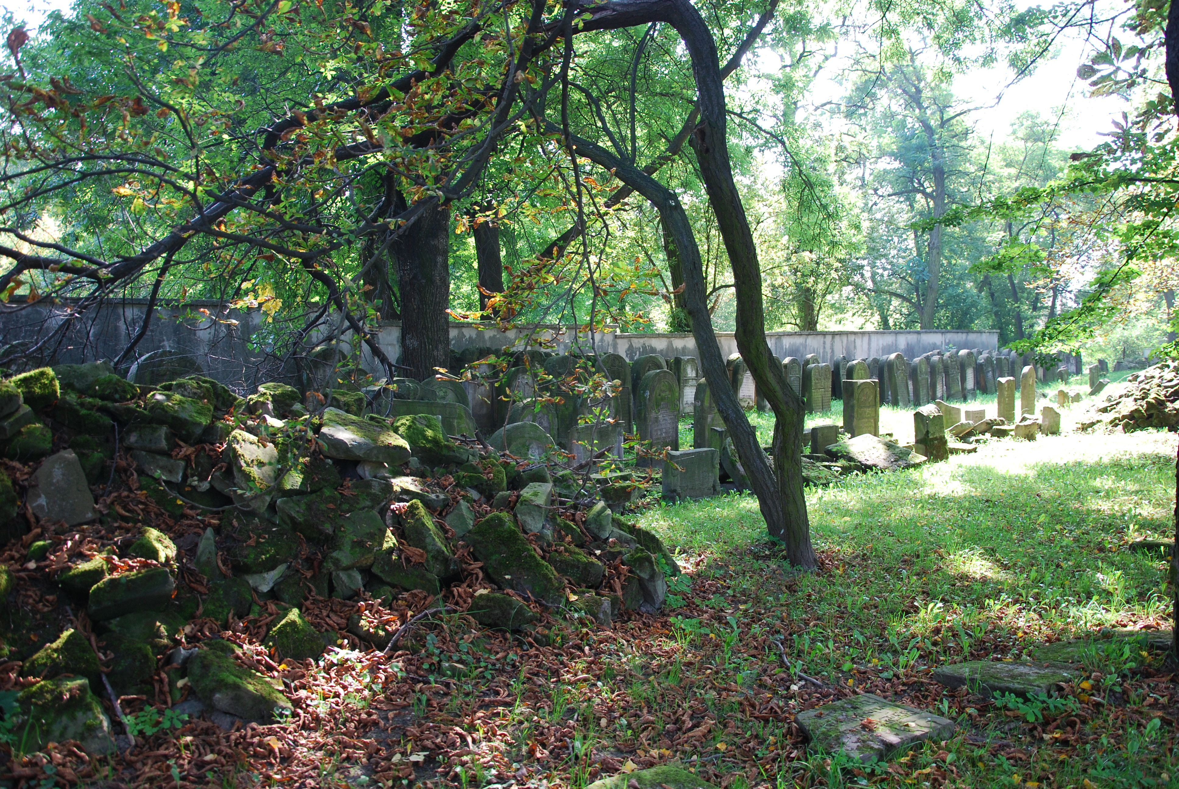 Ostrowiec Świętokrzyski, cmentarz żydowski